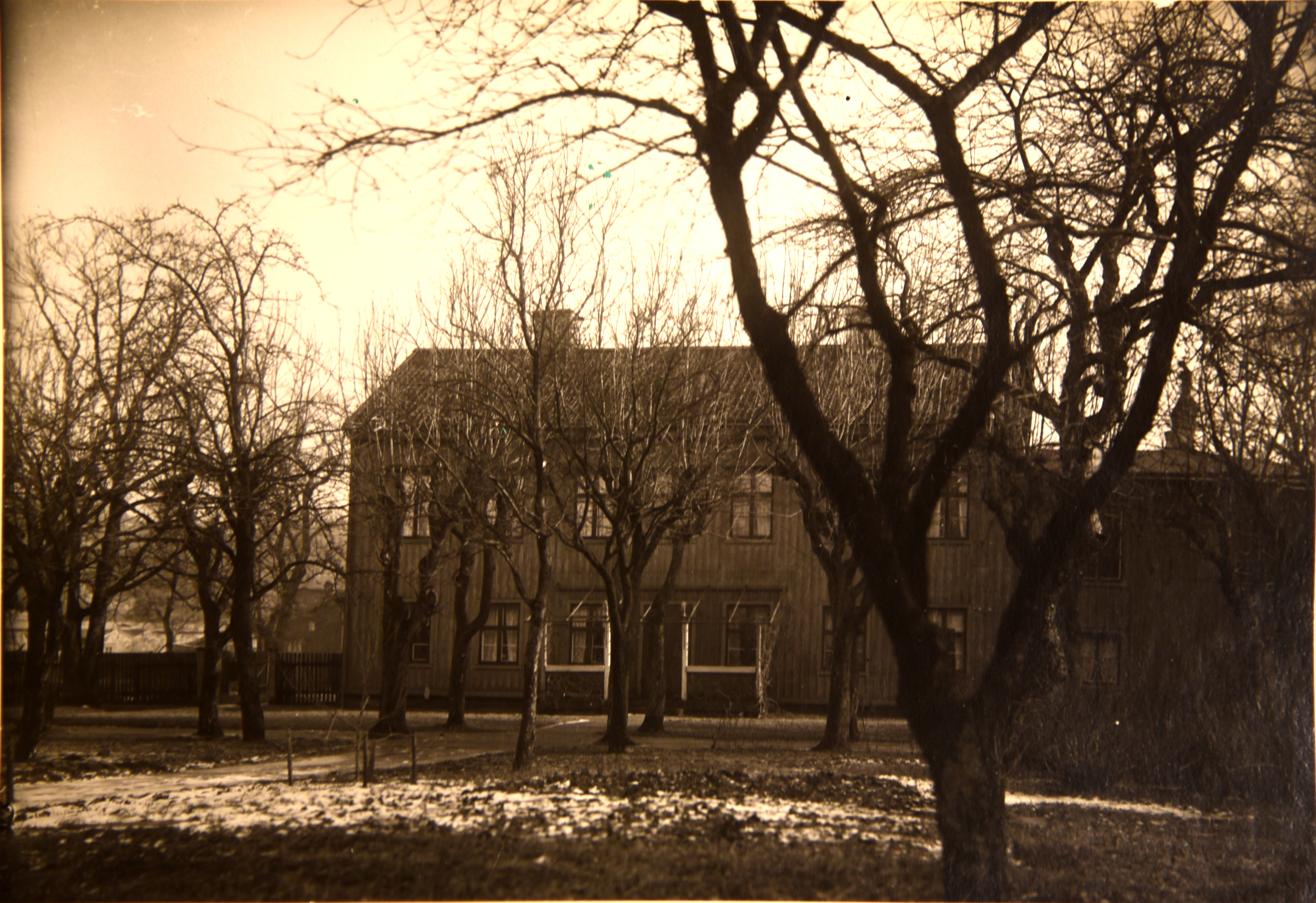 Södra Burgården i stadsdelen Heden i Göteborg år 1920.